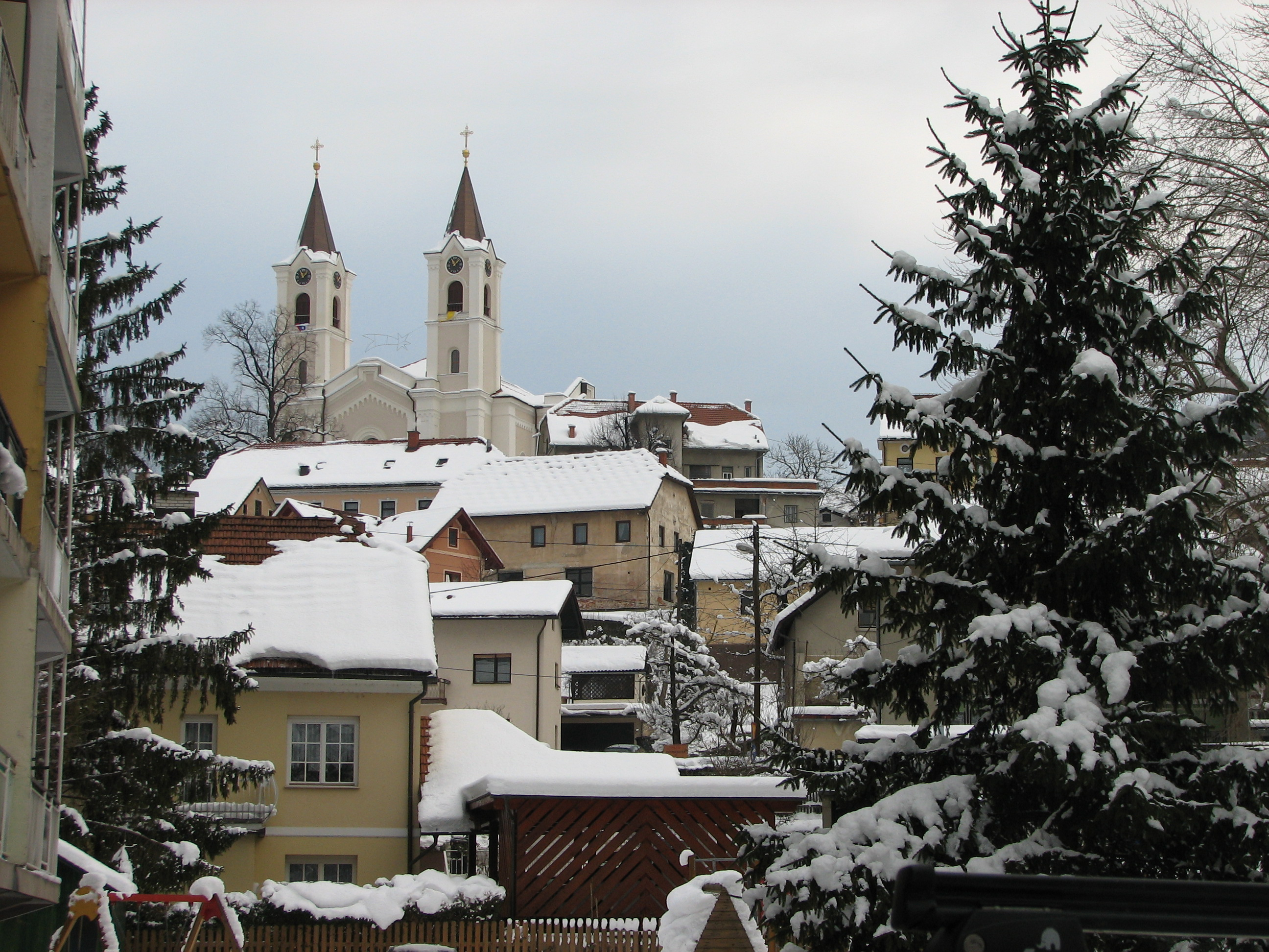 Zagorje ob Savi: pogled s Ceste zmage proti cerkvi Sv. Petra in Pavla. Avtor: romanm (talk).